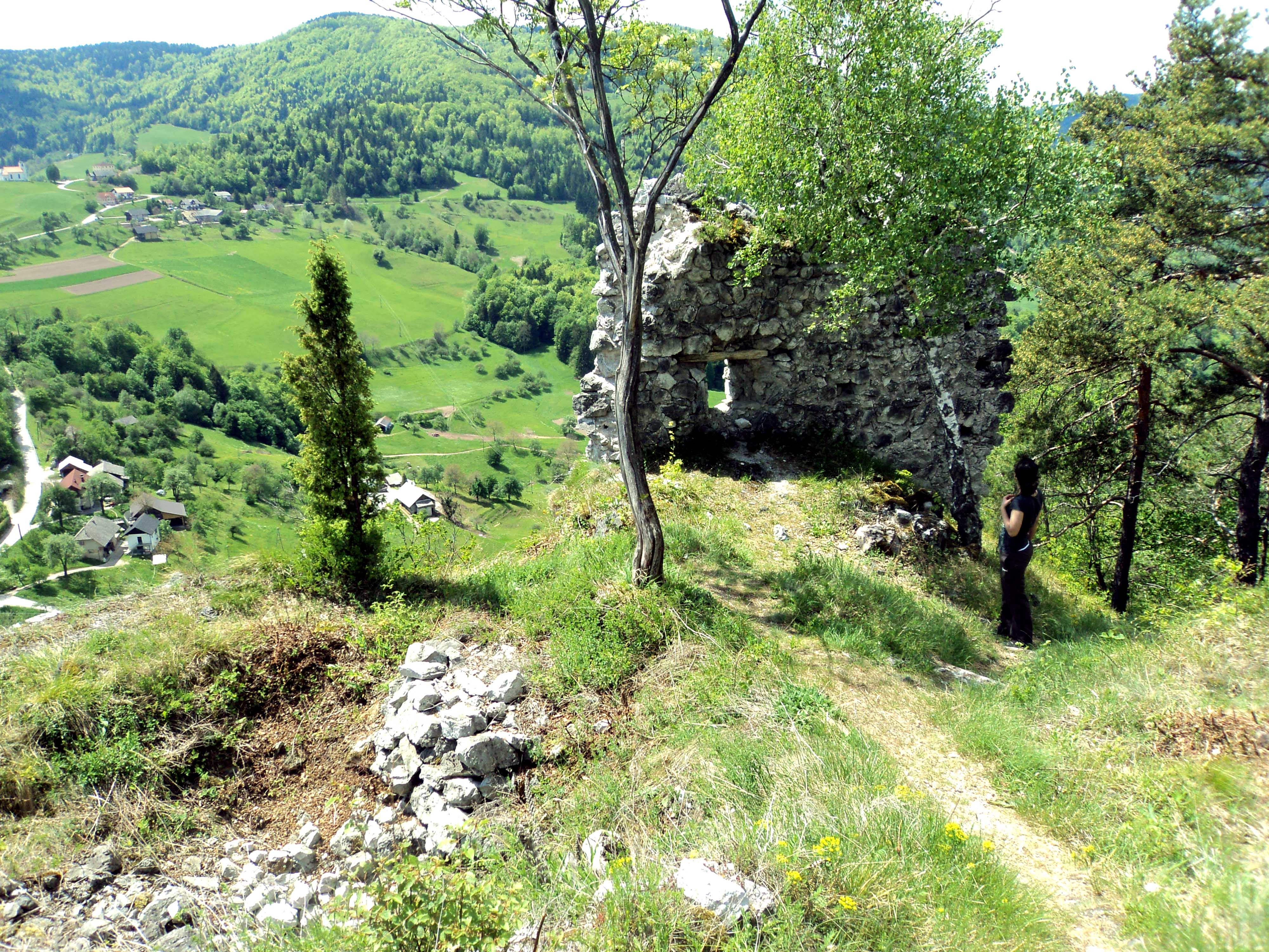 Ruševina gradu Svibno